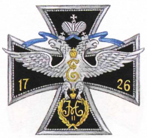 Badge of Sankt-Peterburgsky Guard Regiment